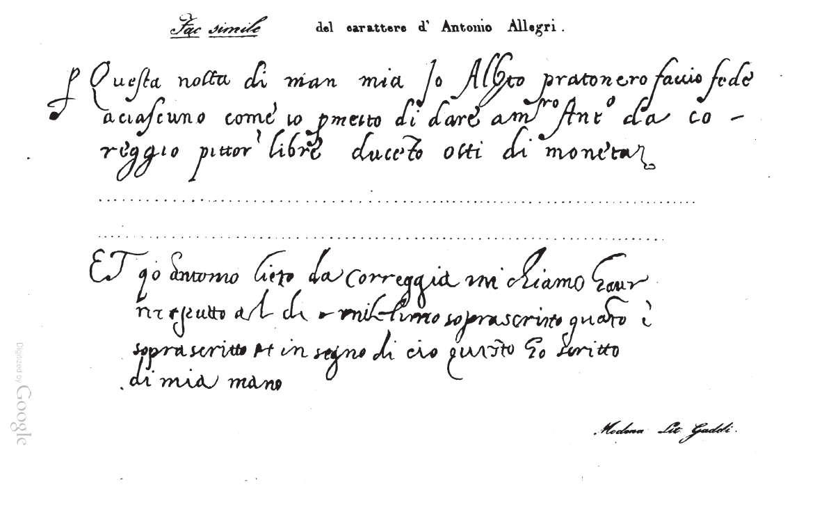 Vertrag zwischen Alberto Pratoneri und Correggio über die Anfertigung des Gemäldes „Die Heilige Nacht“ (Ausschnitt)